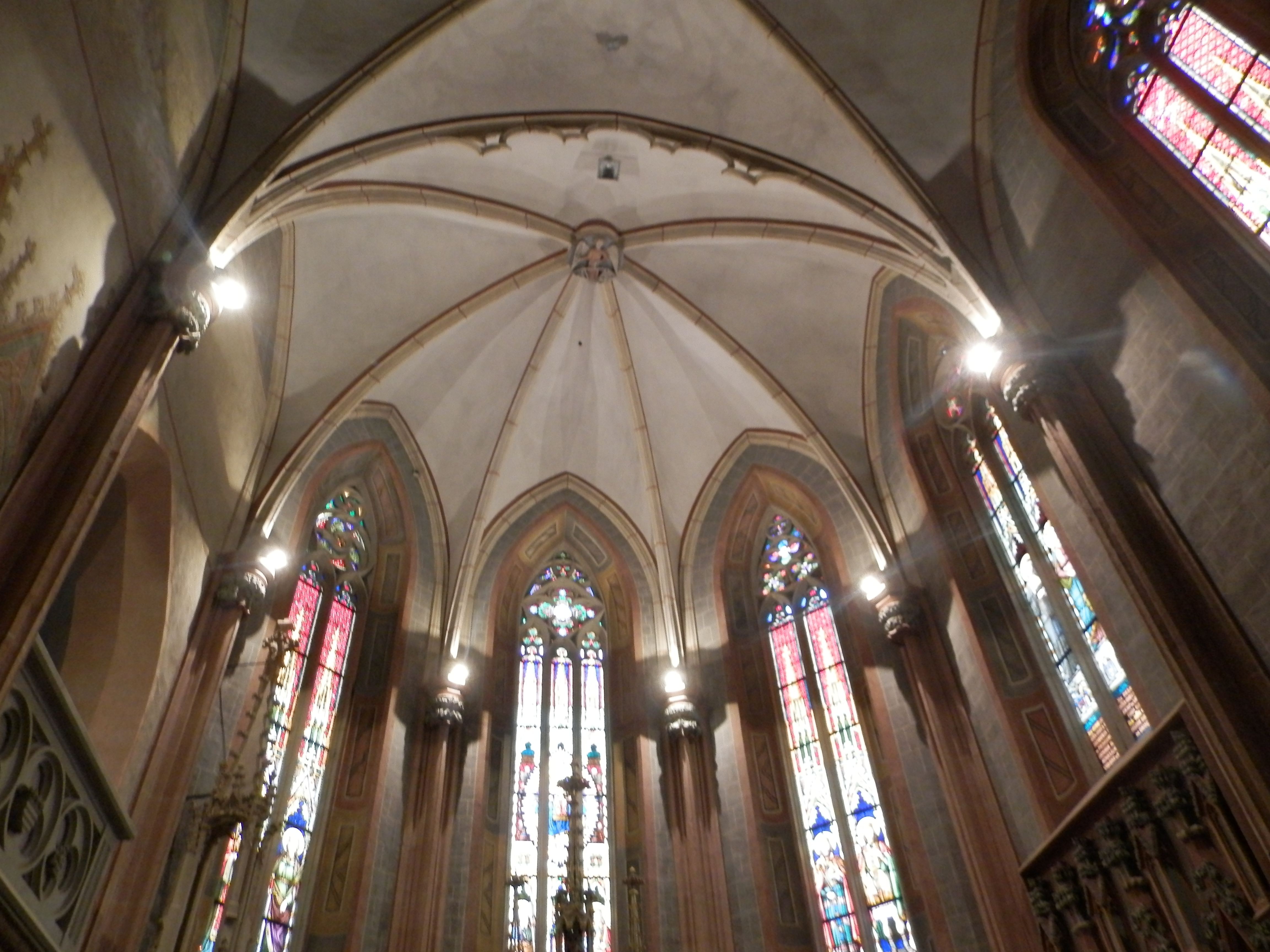 Paprskovitá klenba v presbytériu Kaplnky sv. Michala v Košiciach